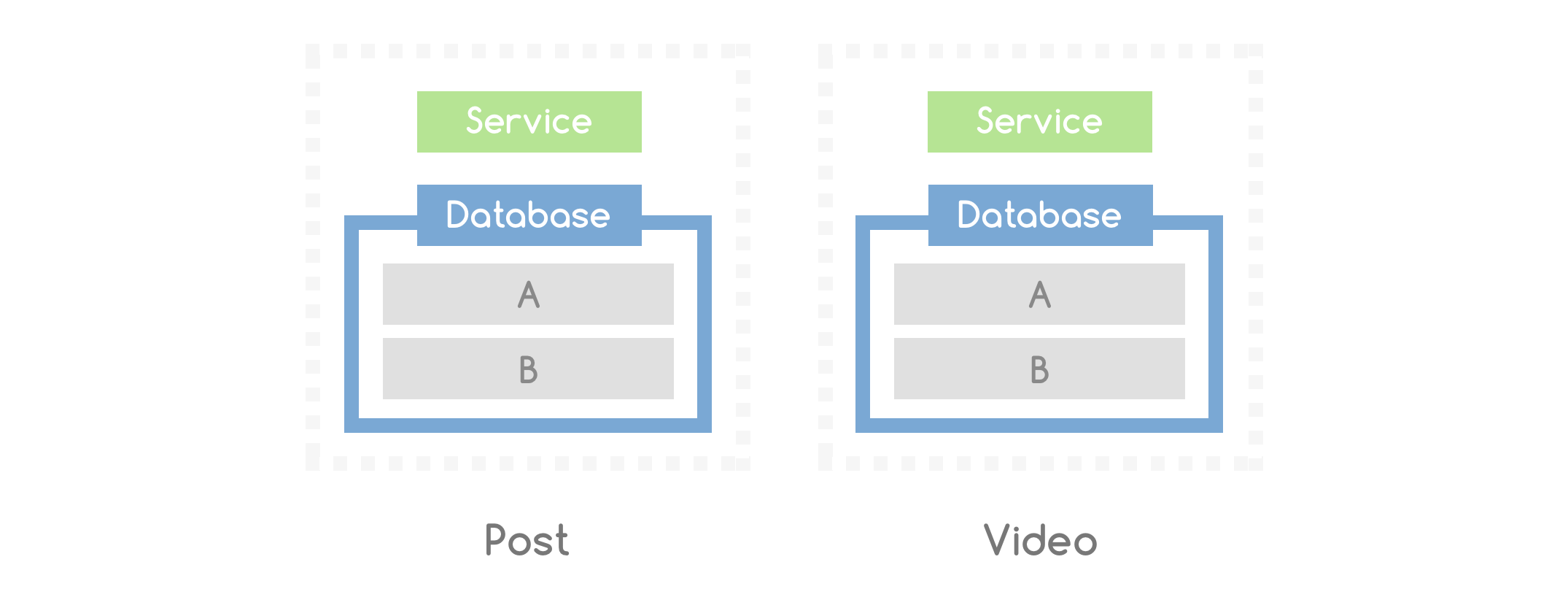 微服務中的資料庫結構規劃。